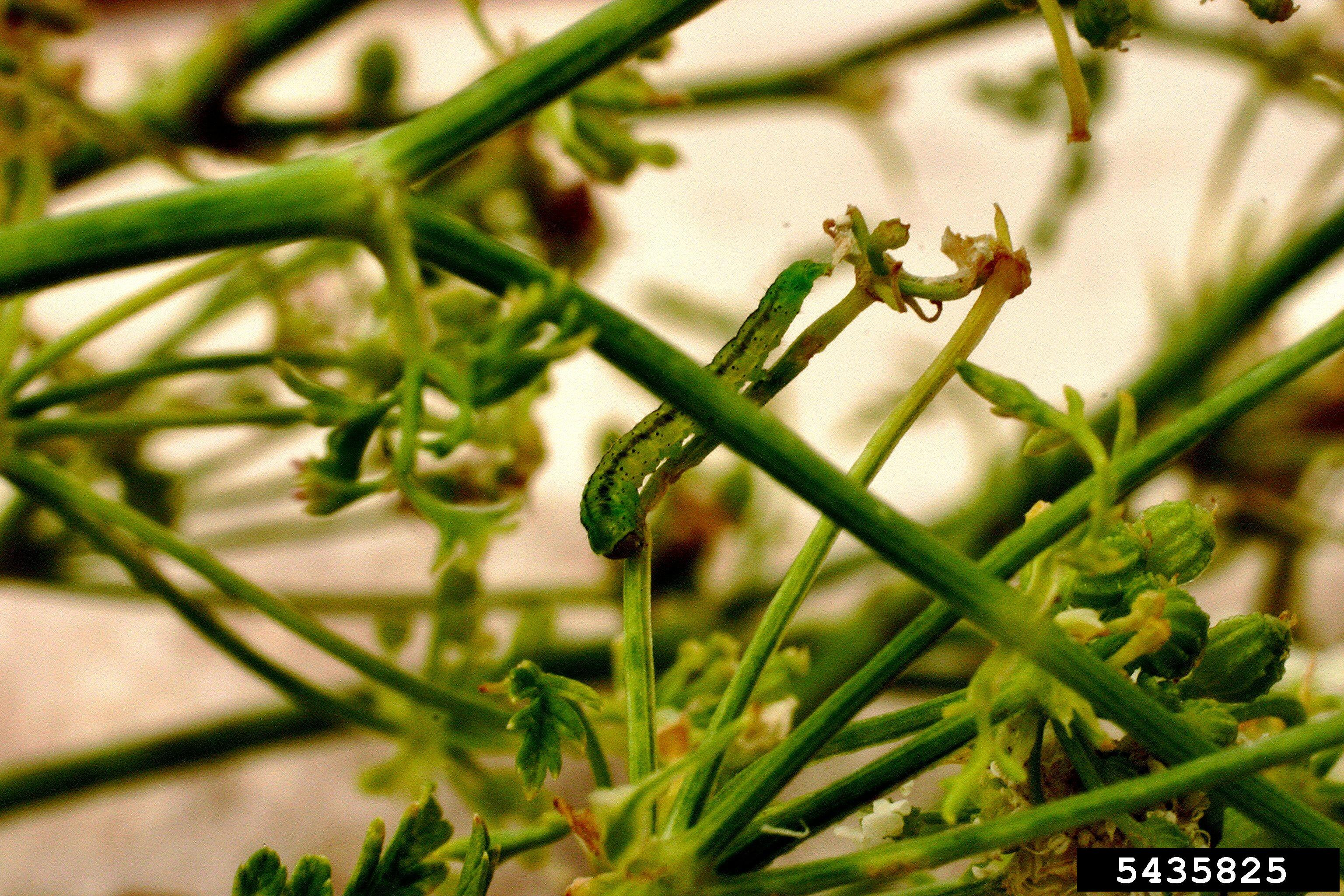 Agonopterix alstroemeriana at Conium maculatum